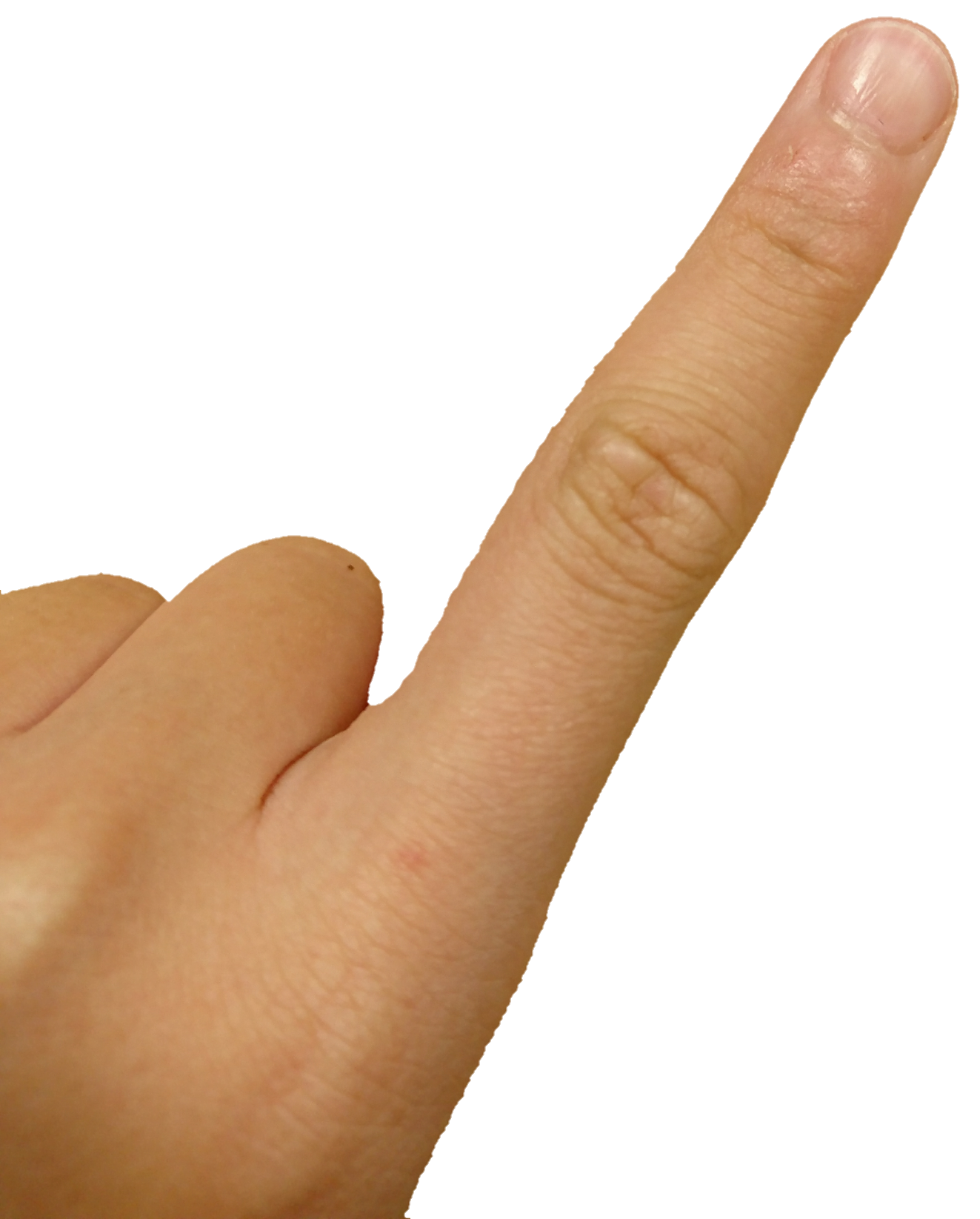 Dedo indicador esquerdo